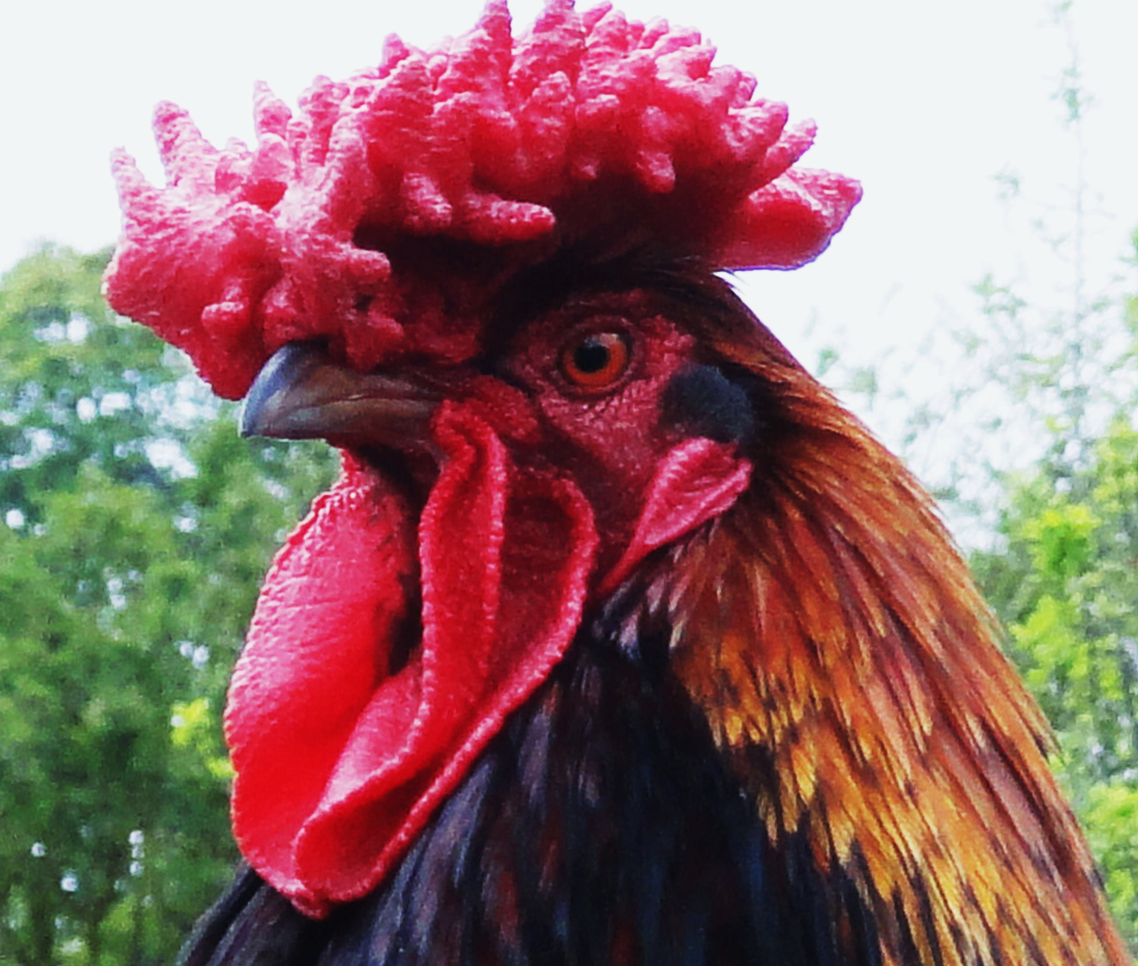 Big Red Rooster ...